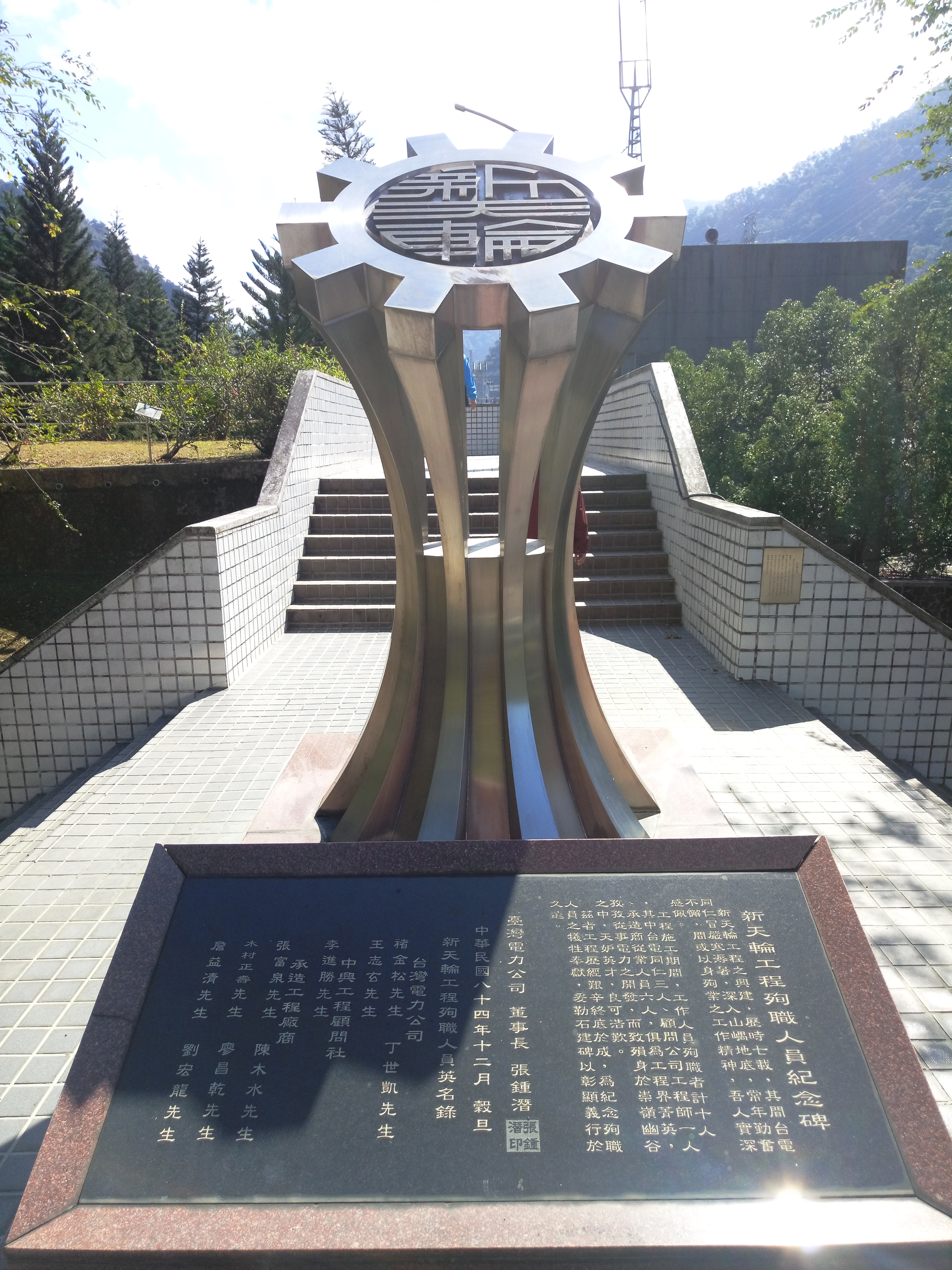 新天輪發電廠爆炸事故紀念碑。